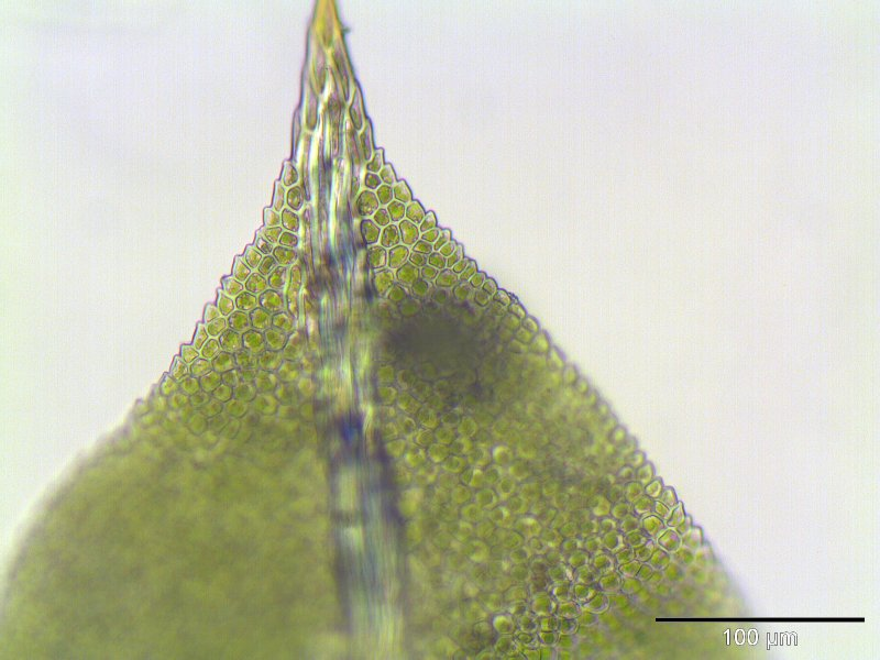 Eibenblättriges Spaltzahnmoos (Fissidens taxifolius), Blattspitze, Vergrößerung: 250x